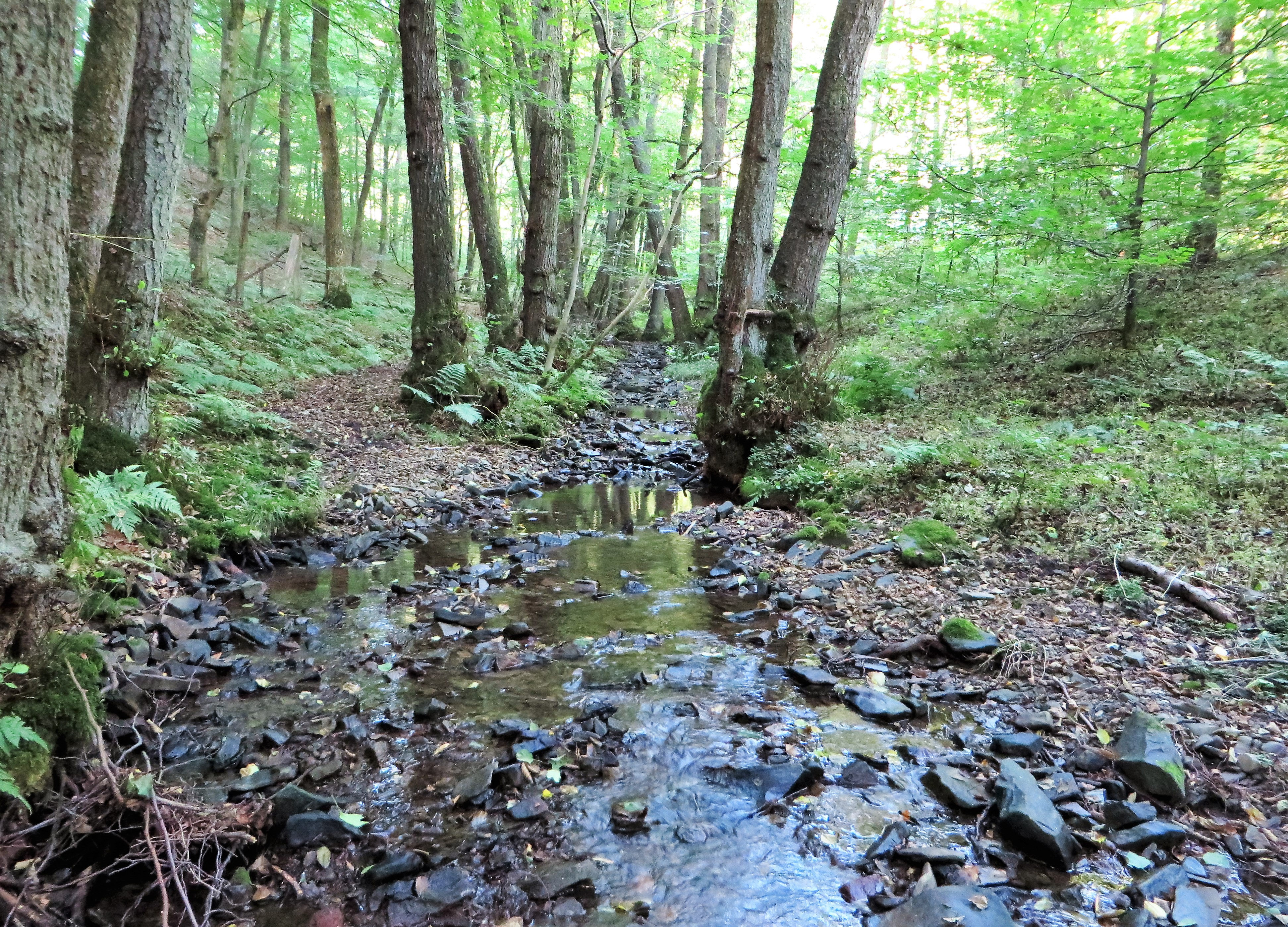 Geschützter Landschaftsbestandteil 1.4.2.74 „Hamper Bach“ in Hagen-Ambrock, Im Hamperbach. Es handelt sich um das weitgehend naturnahe, überwiegend bewaldete Hamperbachtal südwestlich von Ambrock. Der Hamperbach entspringt nördlich von Kalthausen und fließt in Ambrock in die Volme. Im Landschaftsschutzgebiet „Eilper Berg/Langenberg“ gelegen.